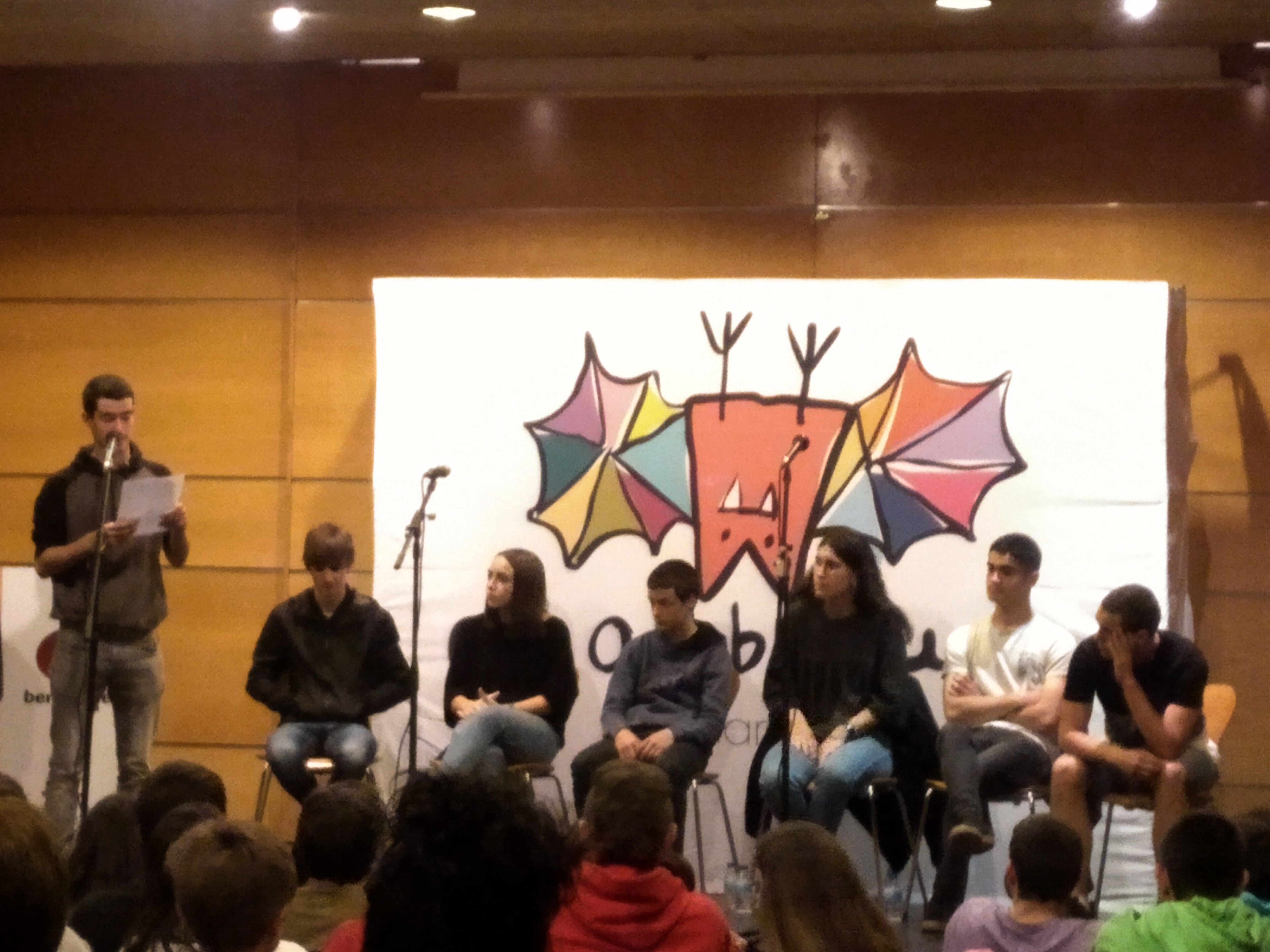 Arabako Eskolarteko Bertsolari txapelketa 2019, Legutioko Kultur Etxean.